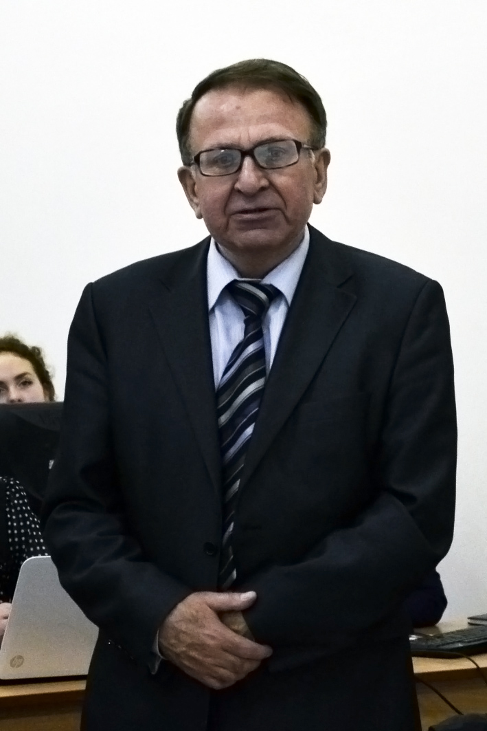 Ткаченко Всеволод